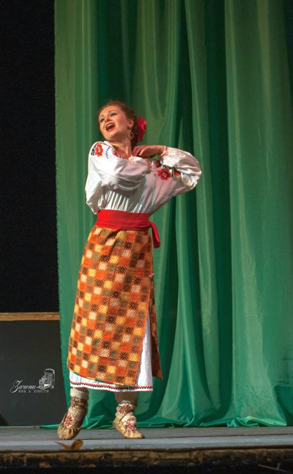 Постановка опери у НМАУ ім П.І.Чайковського, 2014 року, режисер - Лада Шиленко (Туркиня - Ольга Бурда)